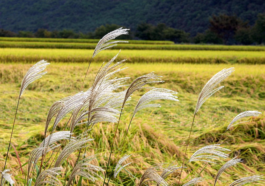 Hahoe Folk Village in Andong, Gyeongsangbuk-do, South Korea.